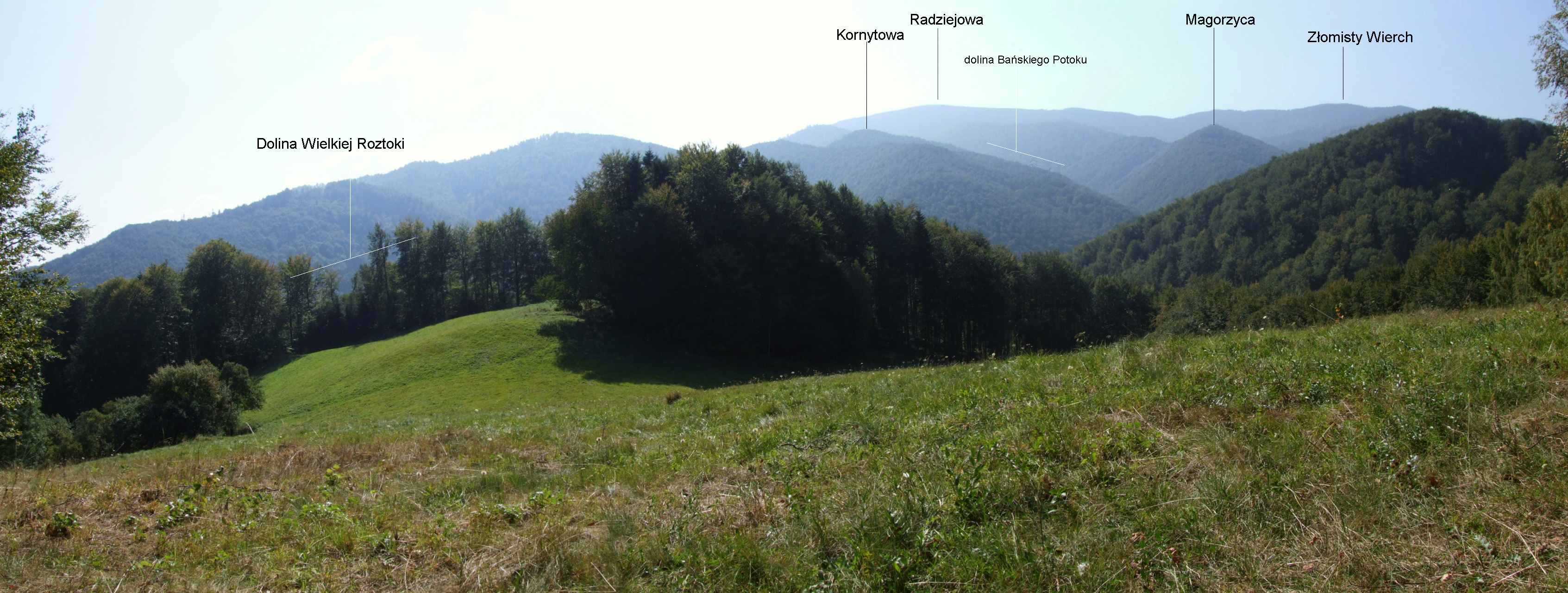 Polana Kanarkówka w Beskidzie Sądeckim